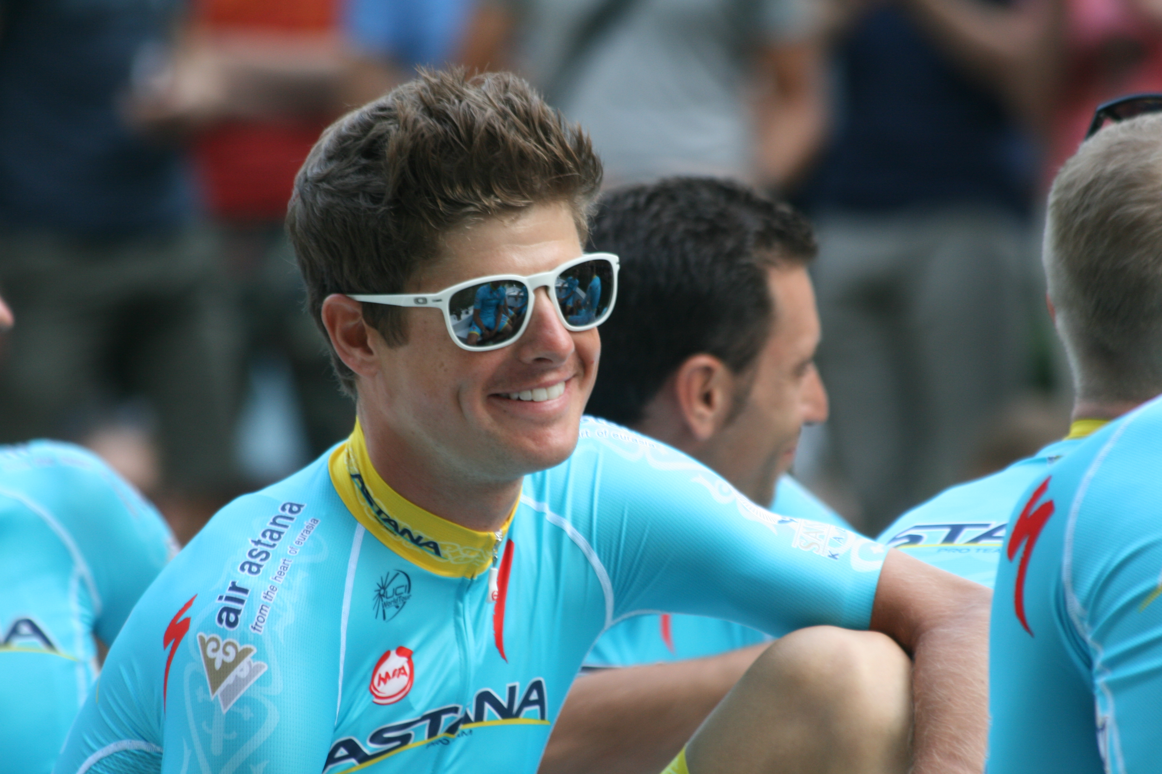 ploegenpresentatie Tour de France 2015 Utrecht